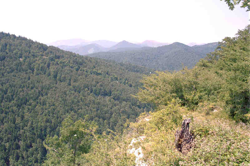 Selva de Irati, en la provincia de Navarra, (España). Vista hacia Casas de Irati desde la subida a Kotcha. Tomada por JMSE el 11 de julio de 2003 y cedida a Wikipedia. Categoría:España (imagen) Categoría:Fotografía (imagen)